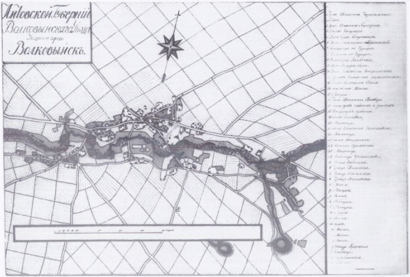 Ваўкавыск. План 1798 г. (РДВГА)